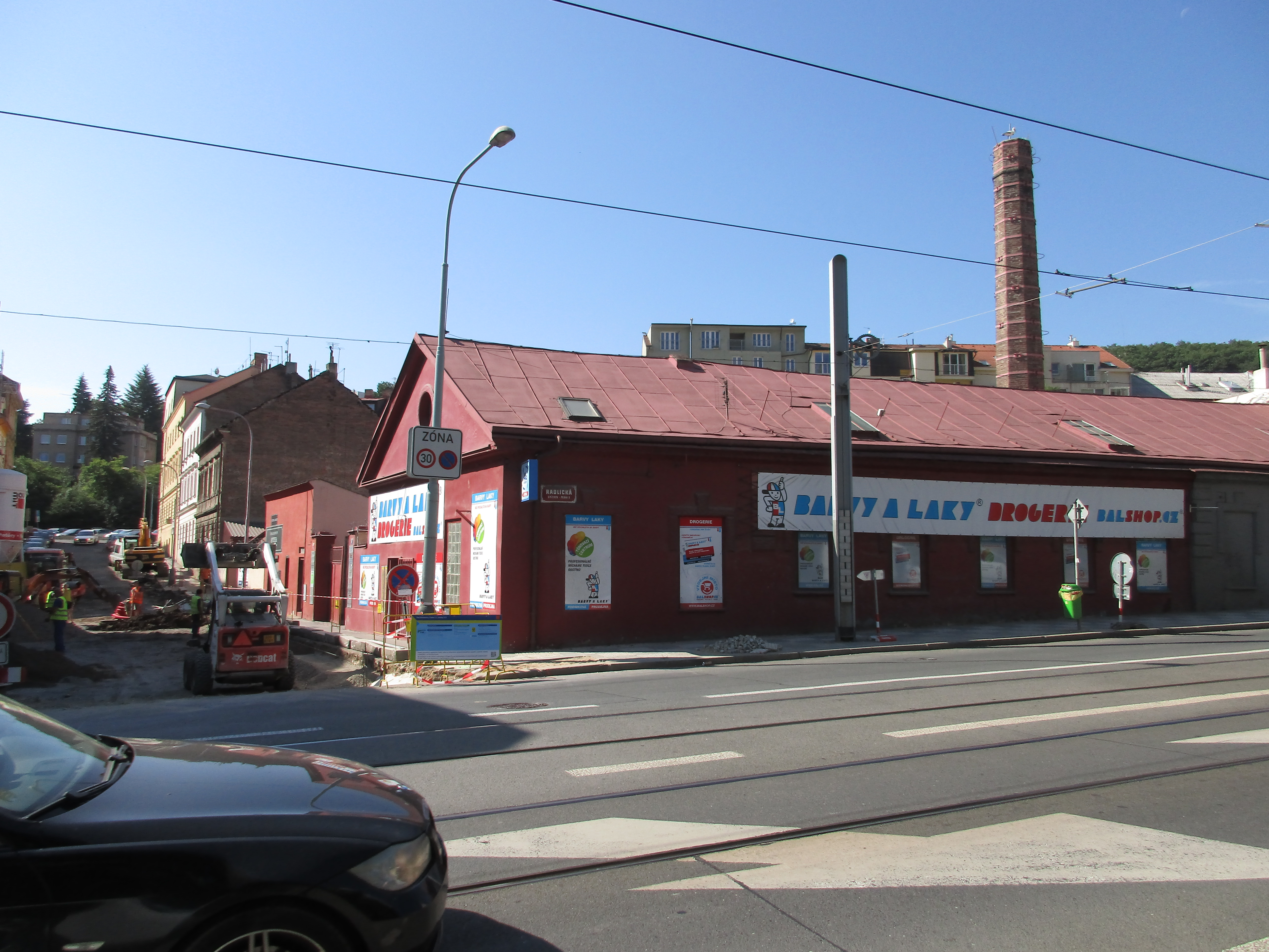 Pod Brentovou 9, Praha 5-Smíchov.